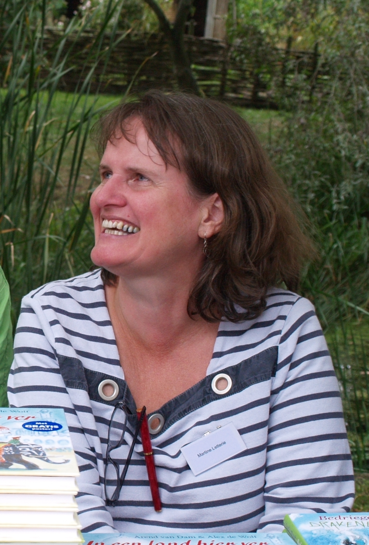 Martine Letterie